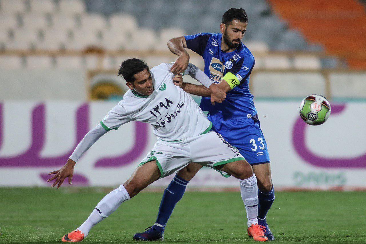 تصاویر نیمه دوم باری استقلال و ماشین سازی تبریز